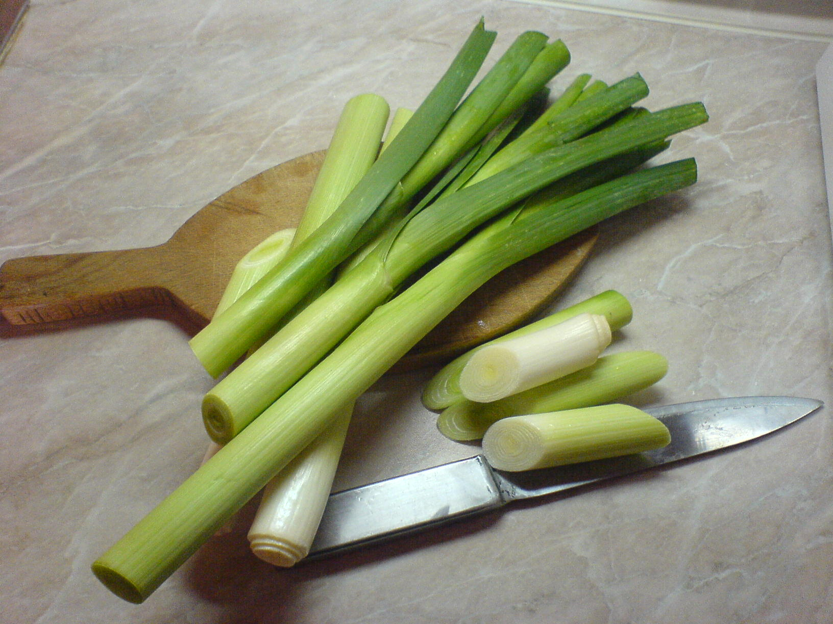 Leeks (Allium porrum)